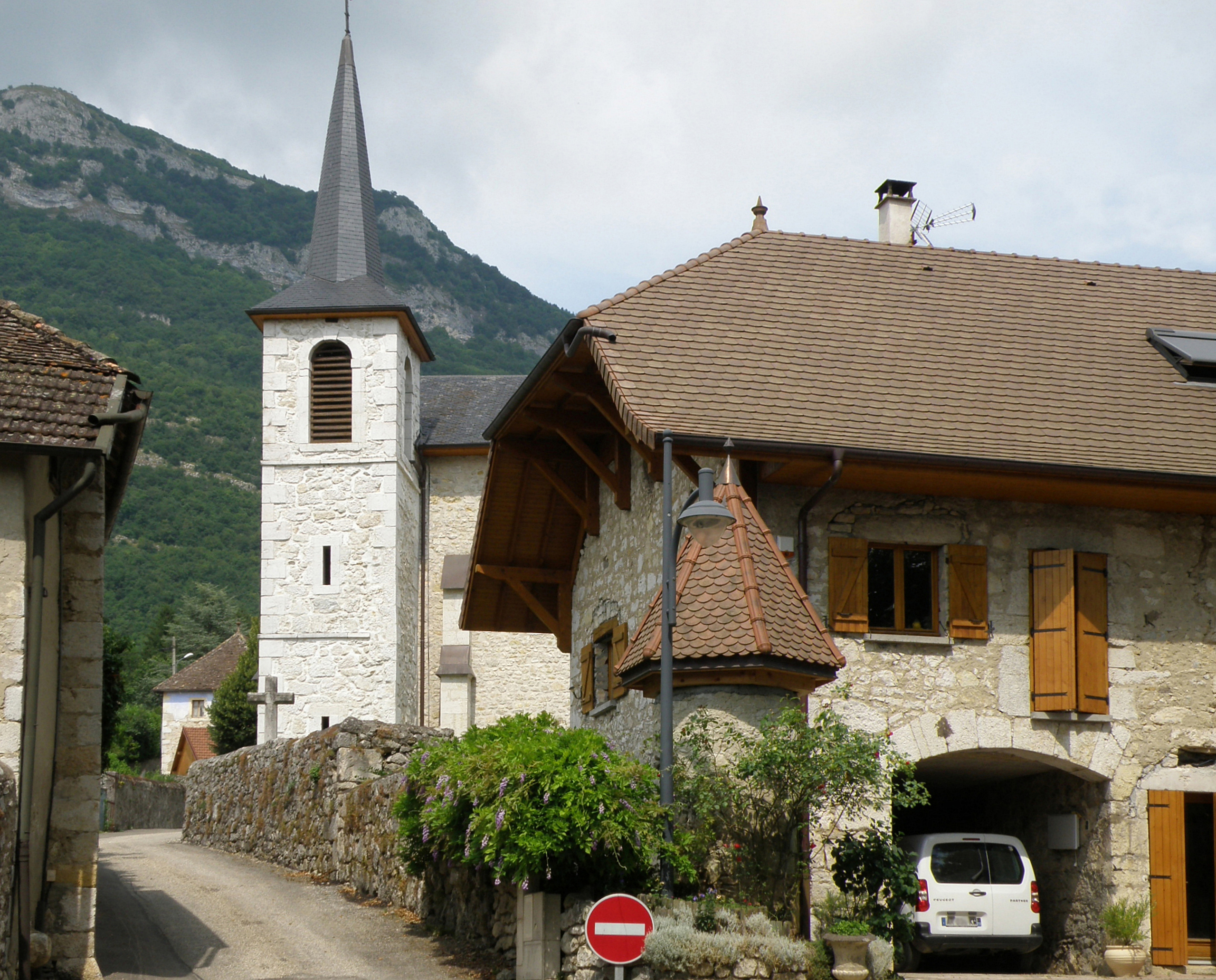 Billième, comm. du département de la Savoie (région Rhône-Alpes, France). Aspect du bourg, avec le clocher de l'église Saint-Pierre-es-Liens.